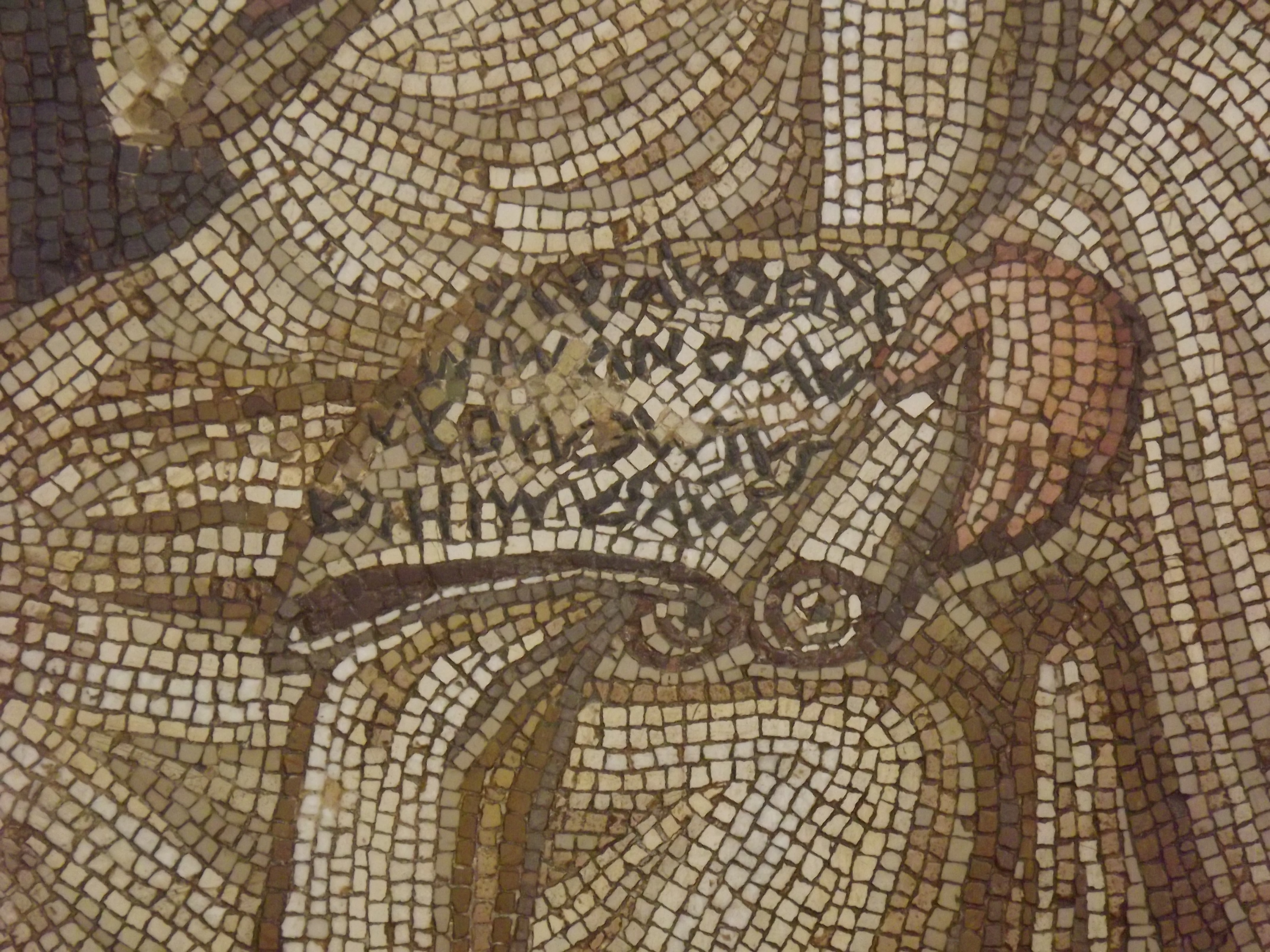 Virgile et les Muses au Bardo (Tunis)